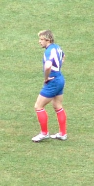 Le XV de France de rugby lors de France-Irlande du tournoi des six nations 2006 au Stade de France